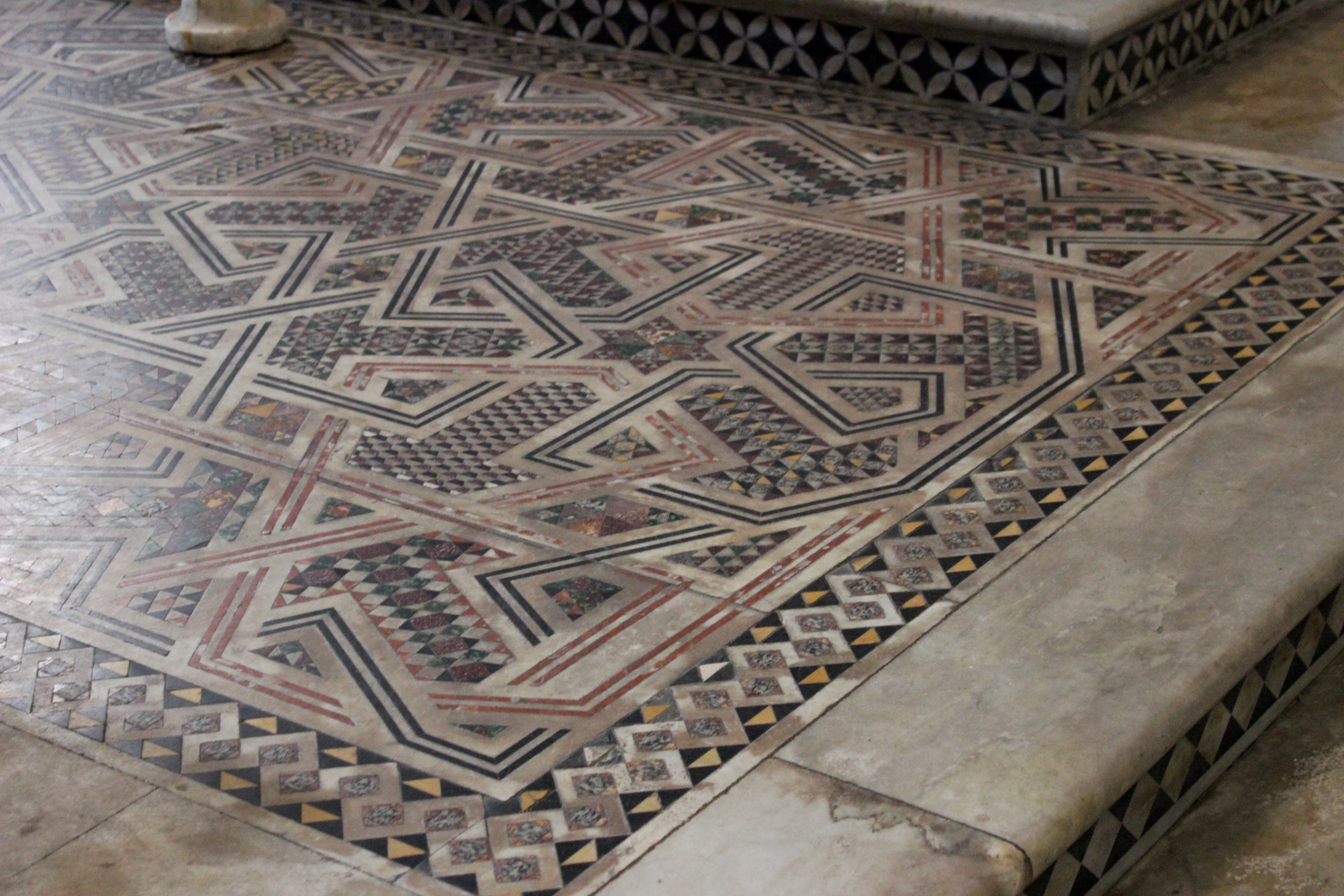 Pisa, Baptisterio. Interior. Detalle del pavimento del presbiterio.